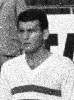 Farkas János olimpiai bajnok magyar labdarúgó.